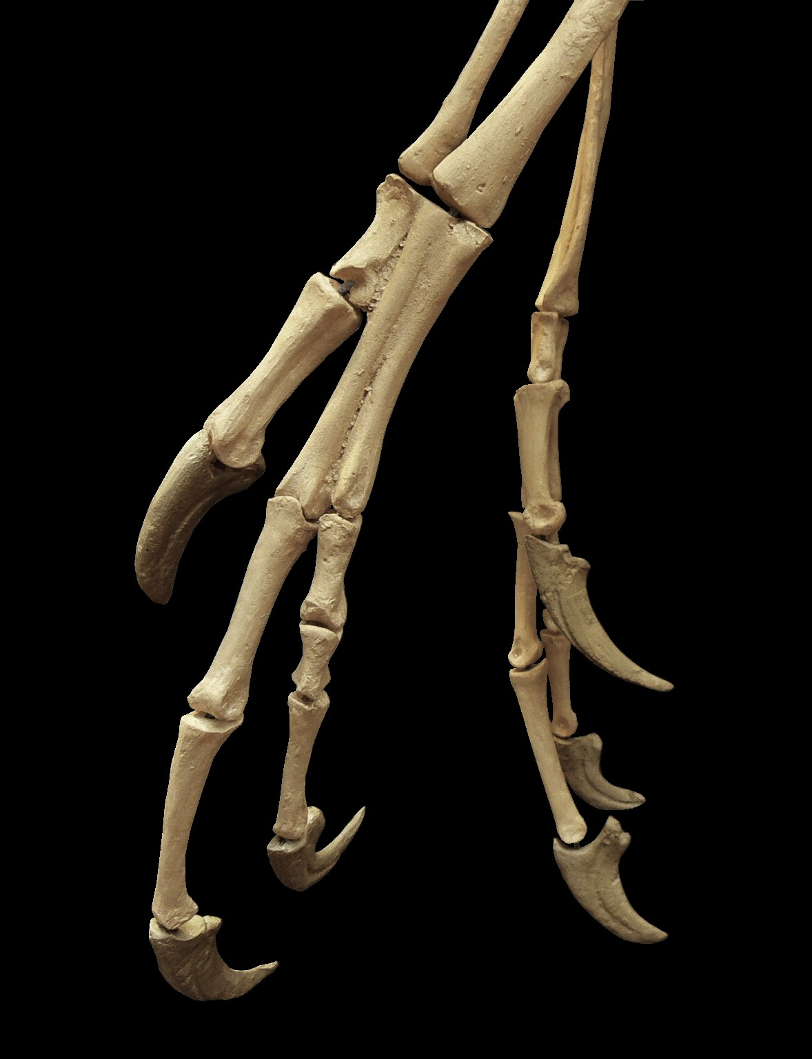 Dromaeosaurus